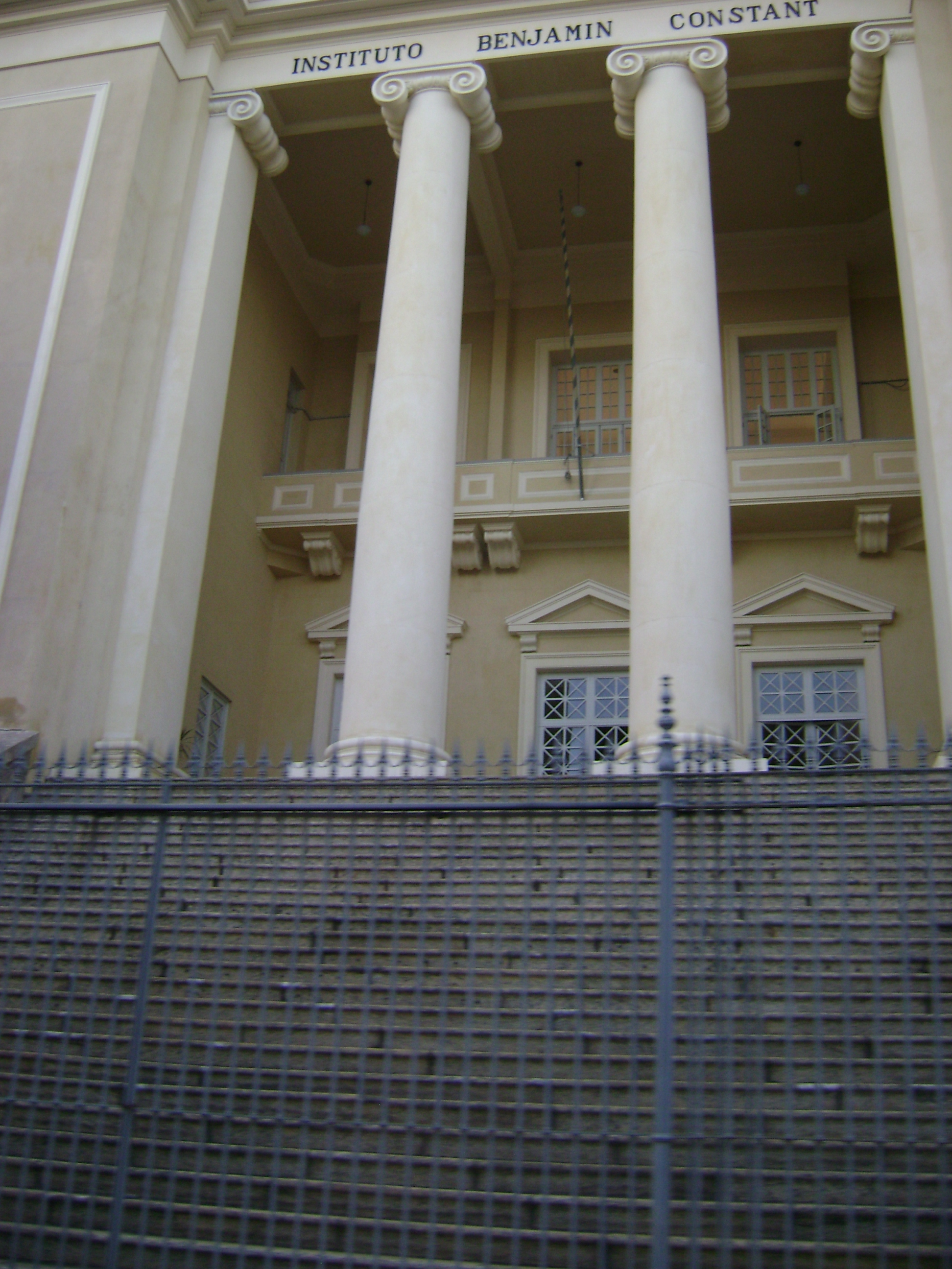 Entrada do Instituto Benjamin Constant na cidade do Rio de Janeiro.